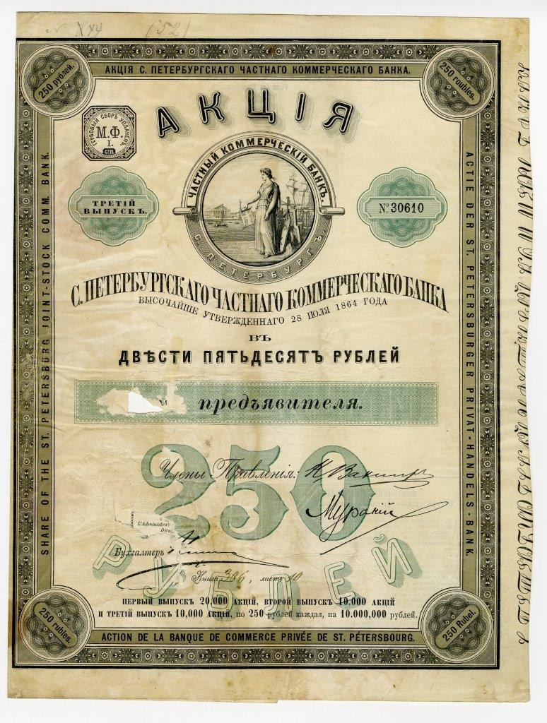 Акция в 250 руб. на предъявителя С.-Петербургского частного коммерческого банка. Санкт-Петербург, 1898 г.